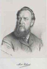 Ebert, Anton (1845-1896), Maler